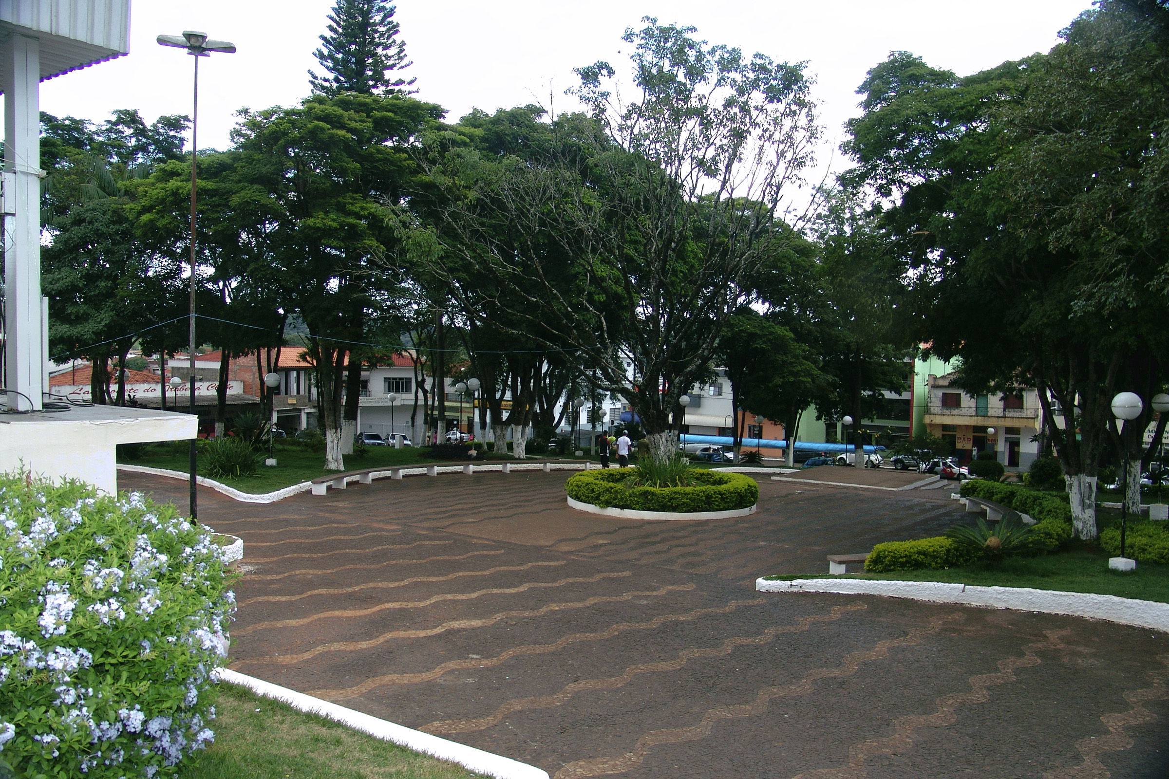 Município de Itaberá, São Paulo, Brasil